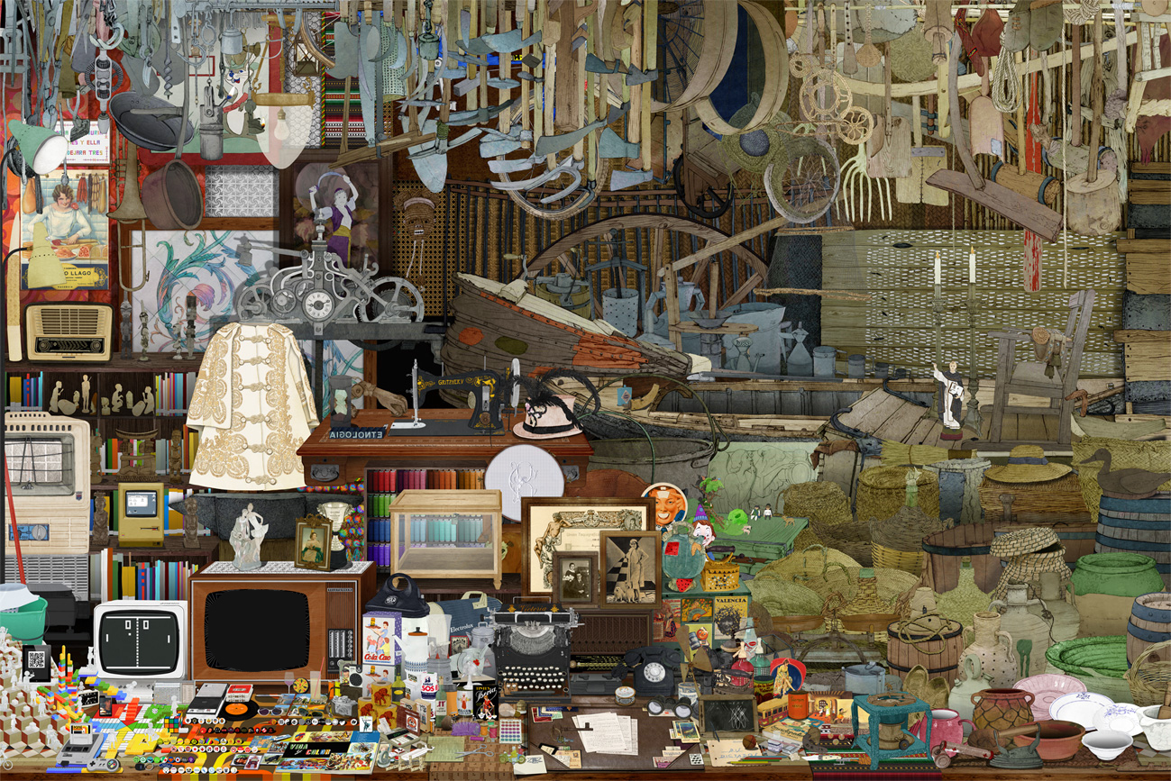 Imatge de presentació del Museu Valencià d'Etnologia. Es troba a l'entrada de les exposicions permanents i vol representar tota la tipologia d'objectes que representen l'etnologia, des de l'època més antiga a la immediatament actual. La imatge ha estat modificada per a fer el seu ús compatible amb els projectes Wikimedia.